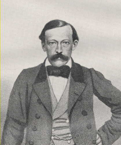 Edmund Hoefer (1819–1882) um 1870